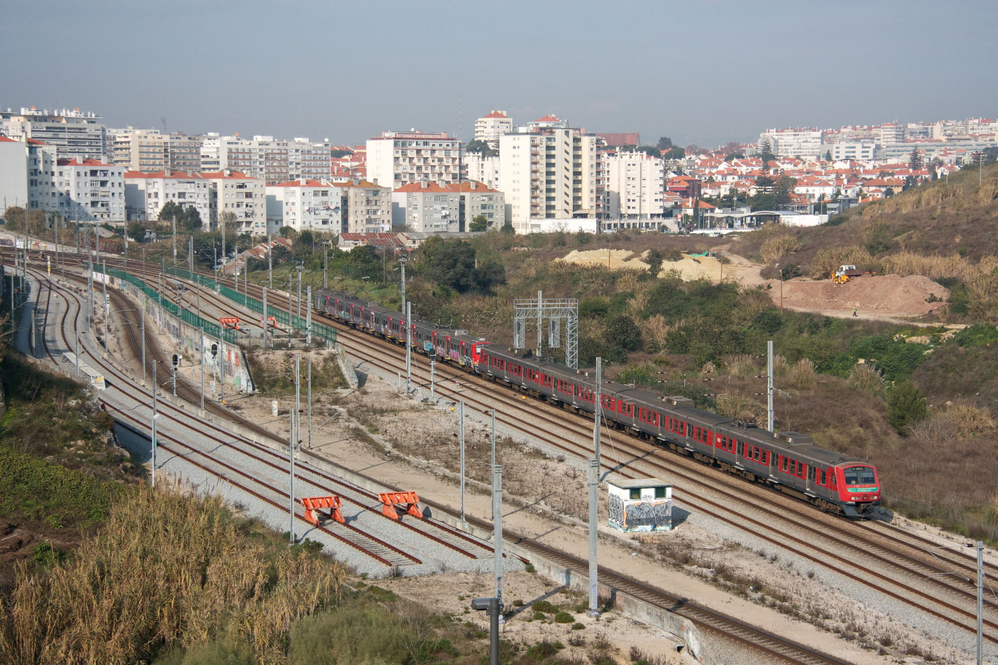 Tipo: Comboio Urbano 18440 [Mira Sintra • Meleças - Lisboa • Oriente] Local: Terminal Técnico de Chelas [Linha de Cintura, PK 7] Data e hora: 25 de Janeiro de 2012 [11h28] Material: Automotoras 2414 e 2324 [Unidades Quádruplas Eléctricas]